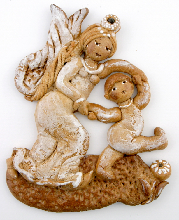 Mézeskalács őrangyal